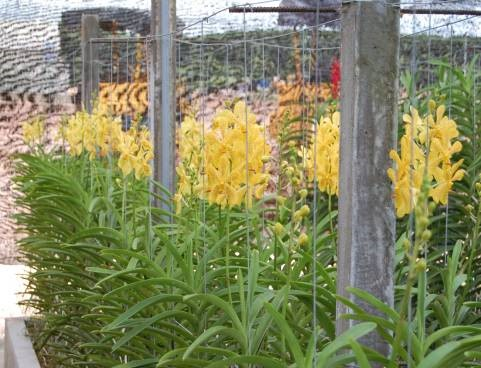 Mokara tại AHTP